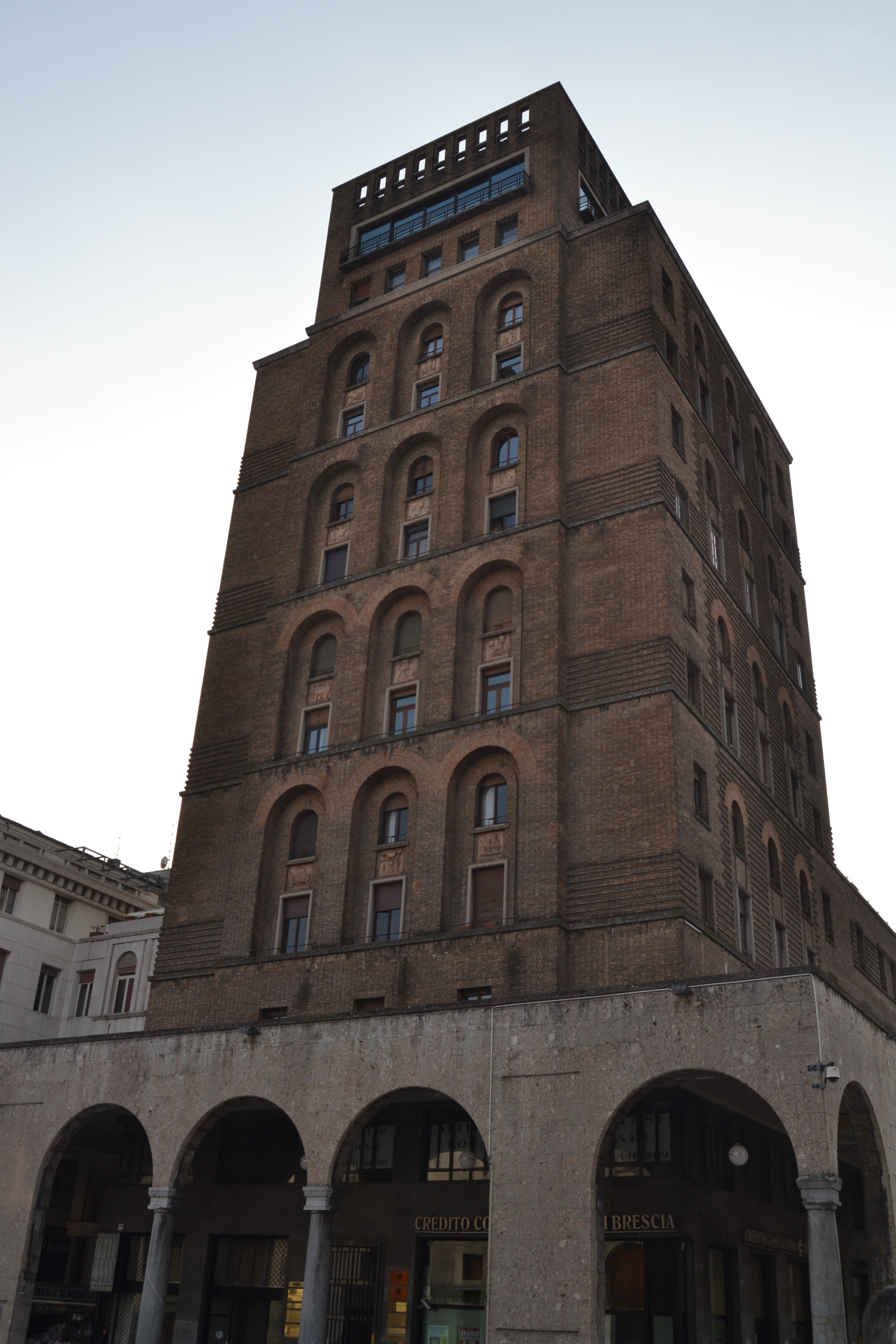 Torrione di Piazza Vittoria a Brescia, Marcello Piacentini 1933, Autore: Simone Agnetti